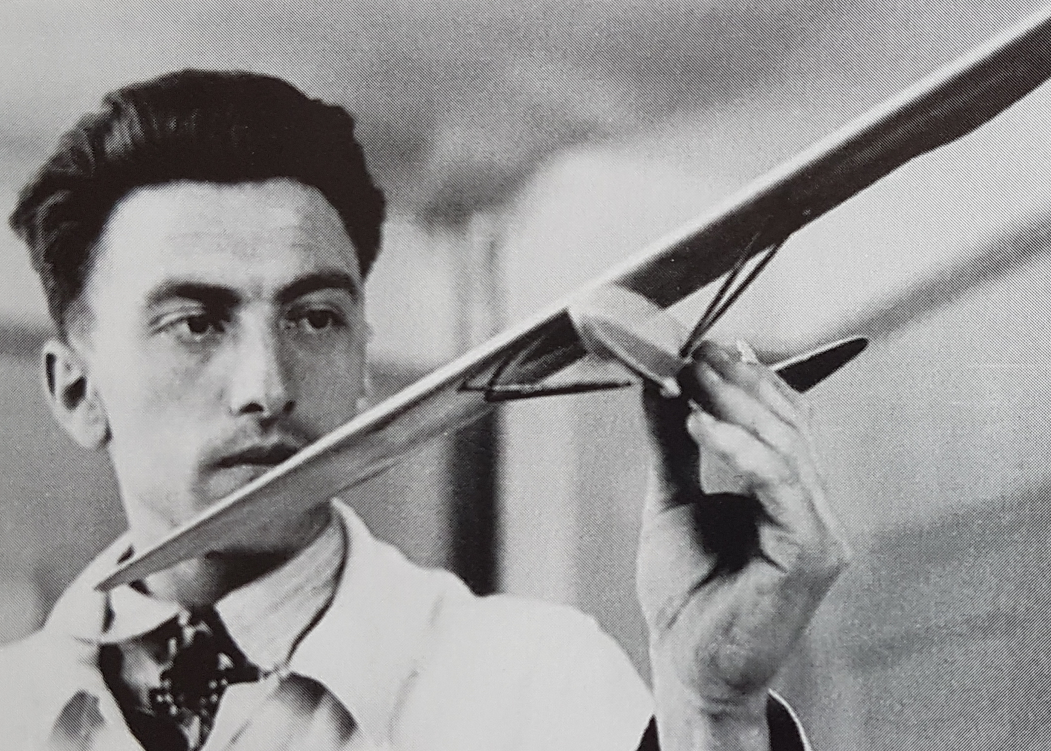 Martin Schempp med en modell av Gö-1